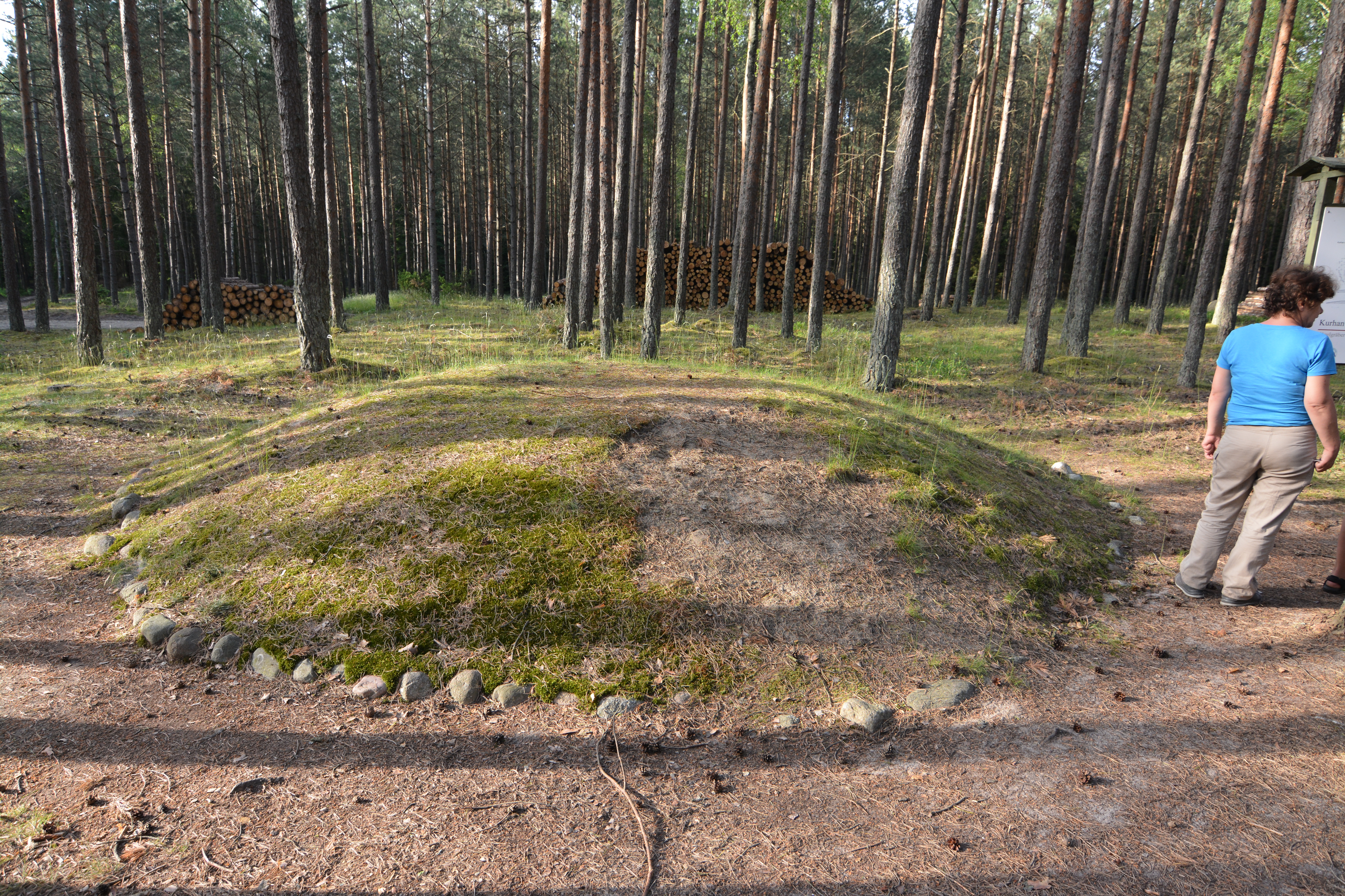 Cmentarzysko z kręgami kamiennymi w Grzybnicy koło Koszalina